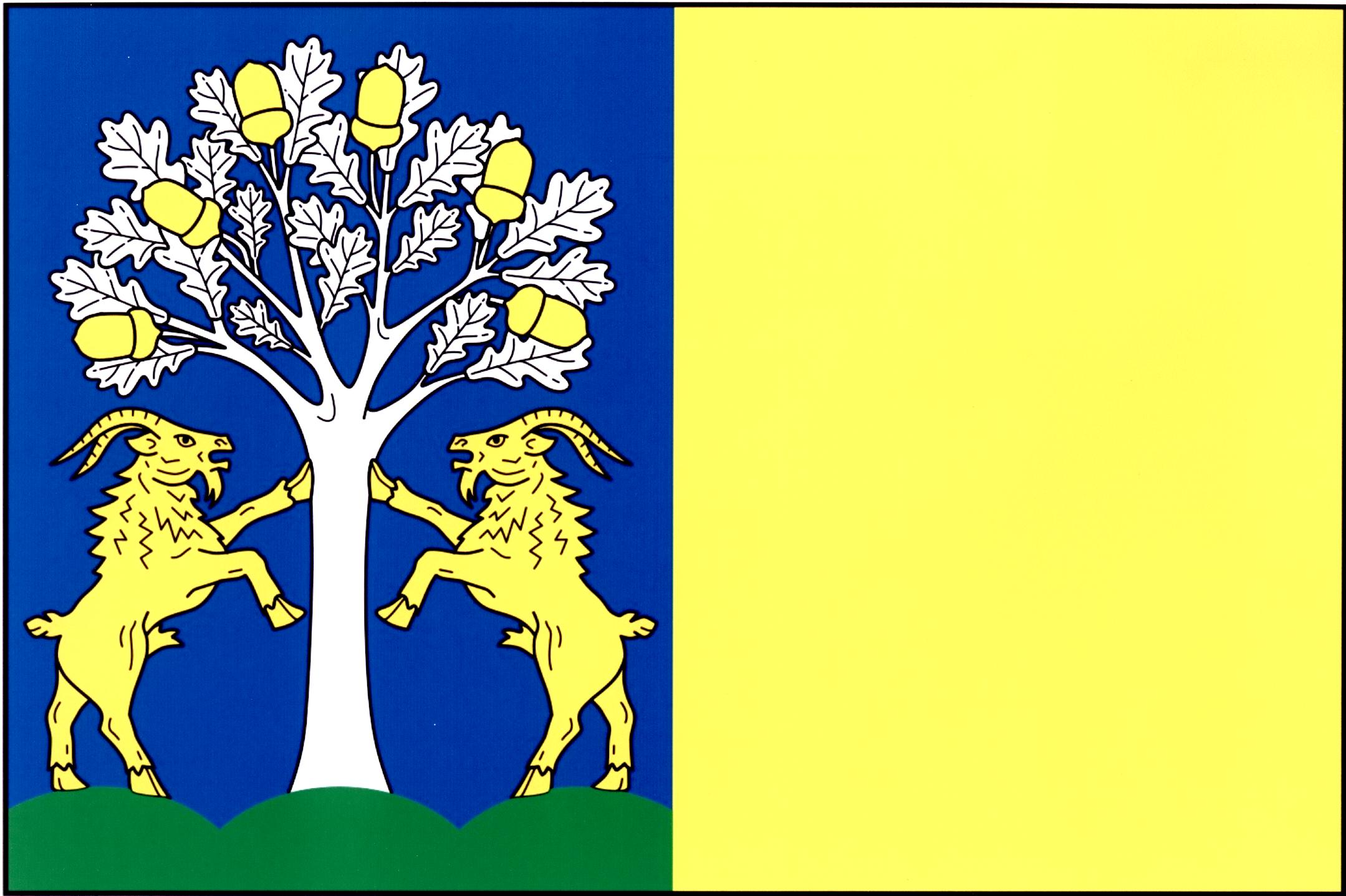 Vlajka obce Prštice